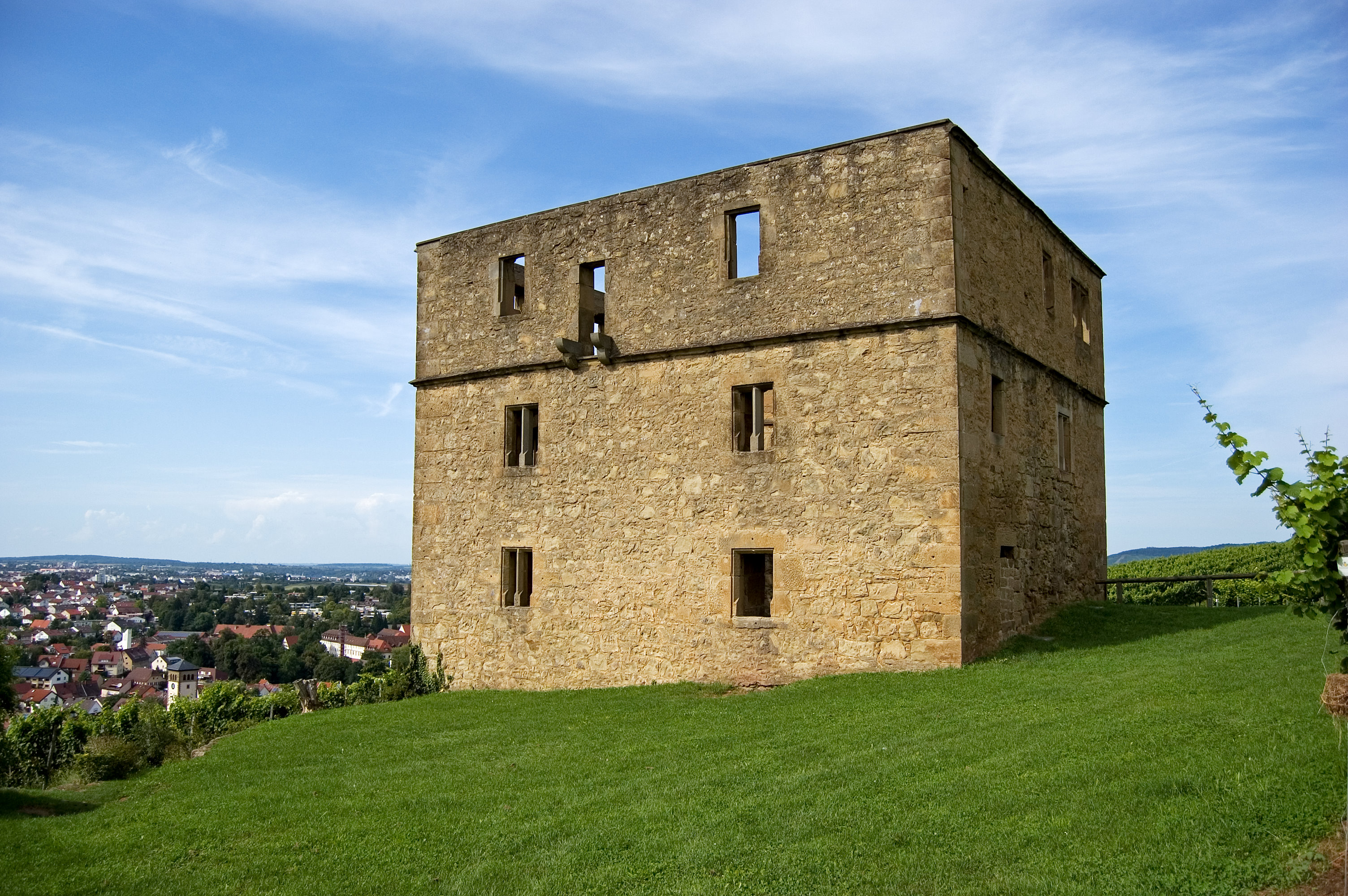 Y-Burg Ruine im Remstal bei Baden-Württemberg.